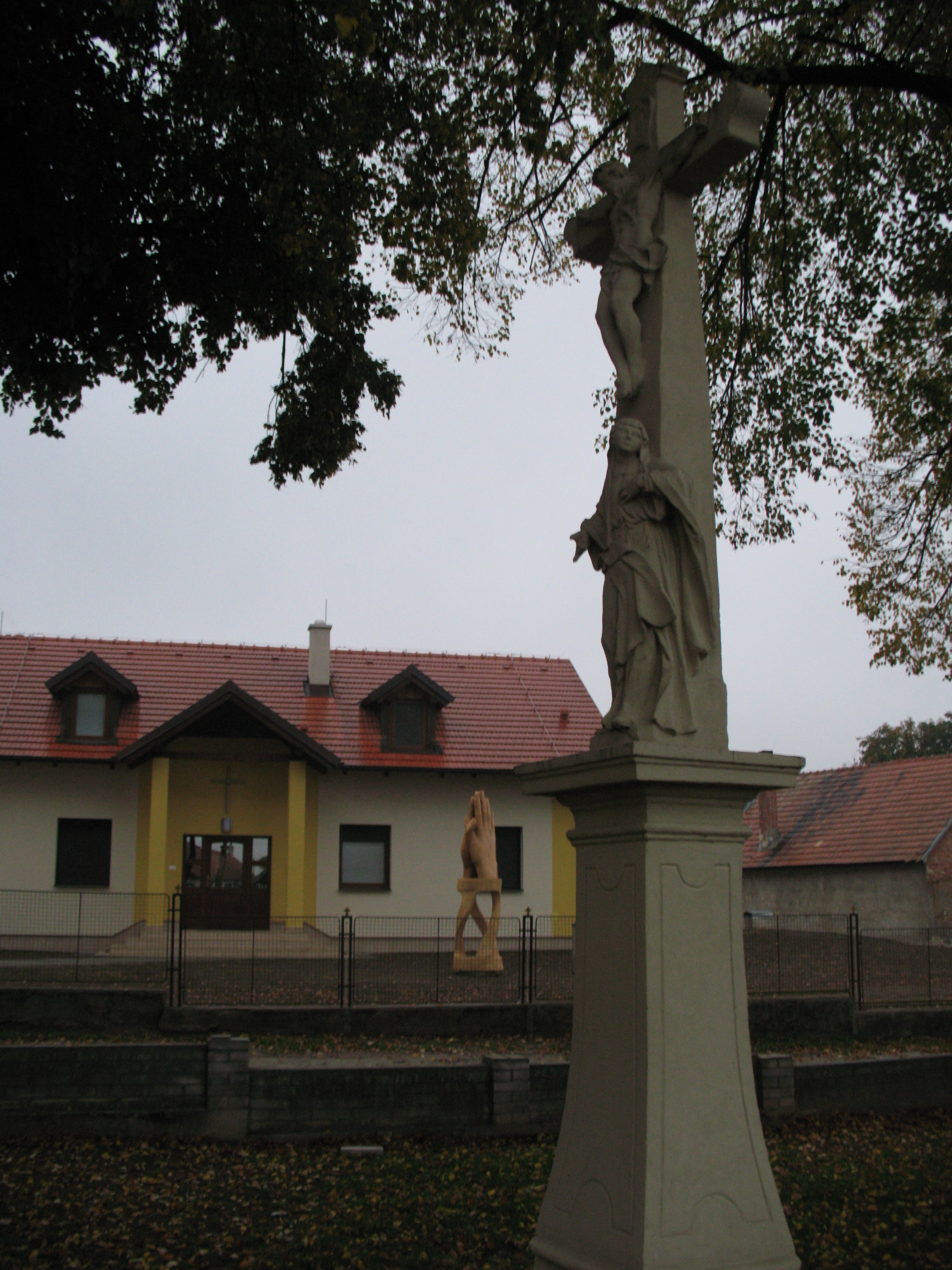 Kovarc